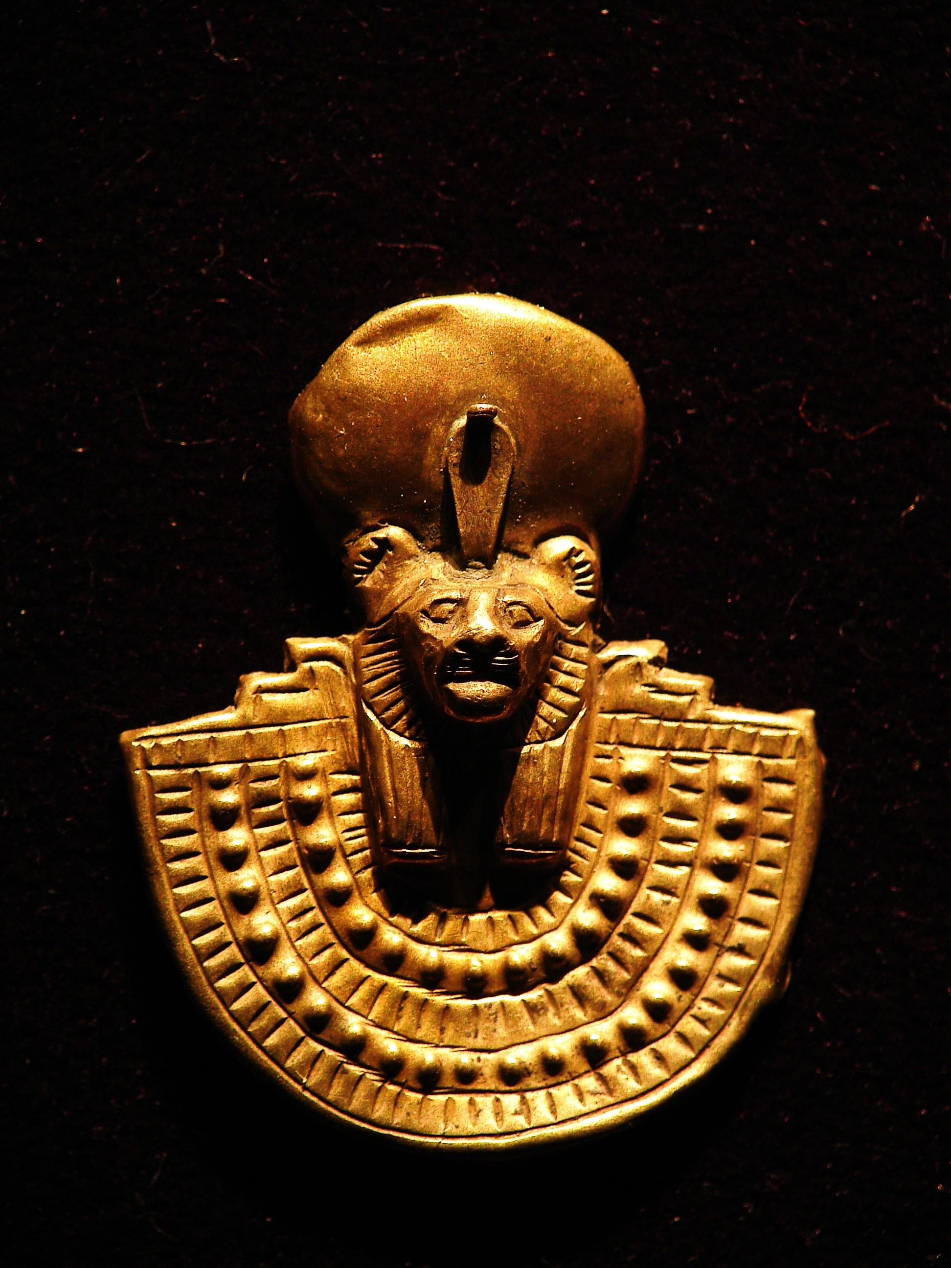 ഈജിപ്ഷ്യൻ ആഭരണം- വാൾട്ടേഴ്സ് ആർട്ട് മ്യൂസിയത്തിലെ ശേഖരത്തിൽ നിന്ന്